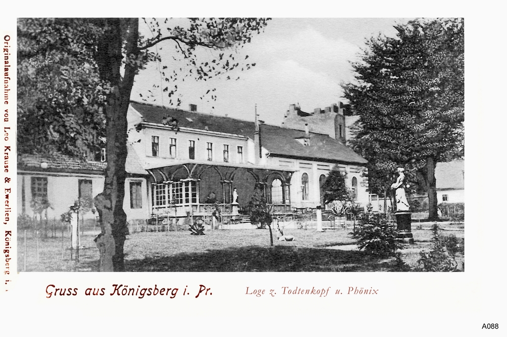 Königsberg